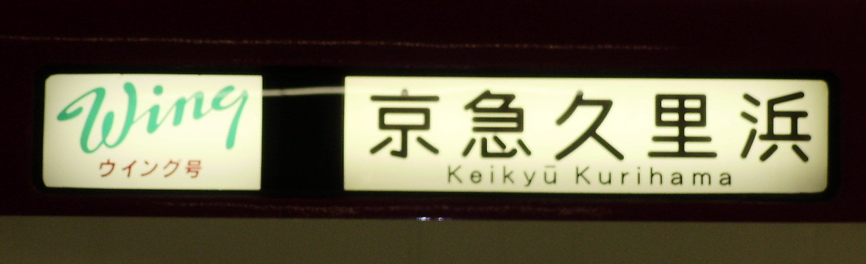 2149編成、京急Wing号の種別幕（Wing表示）・方向幕（行き先表示）。品川駅にて。